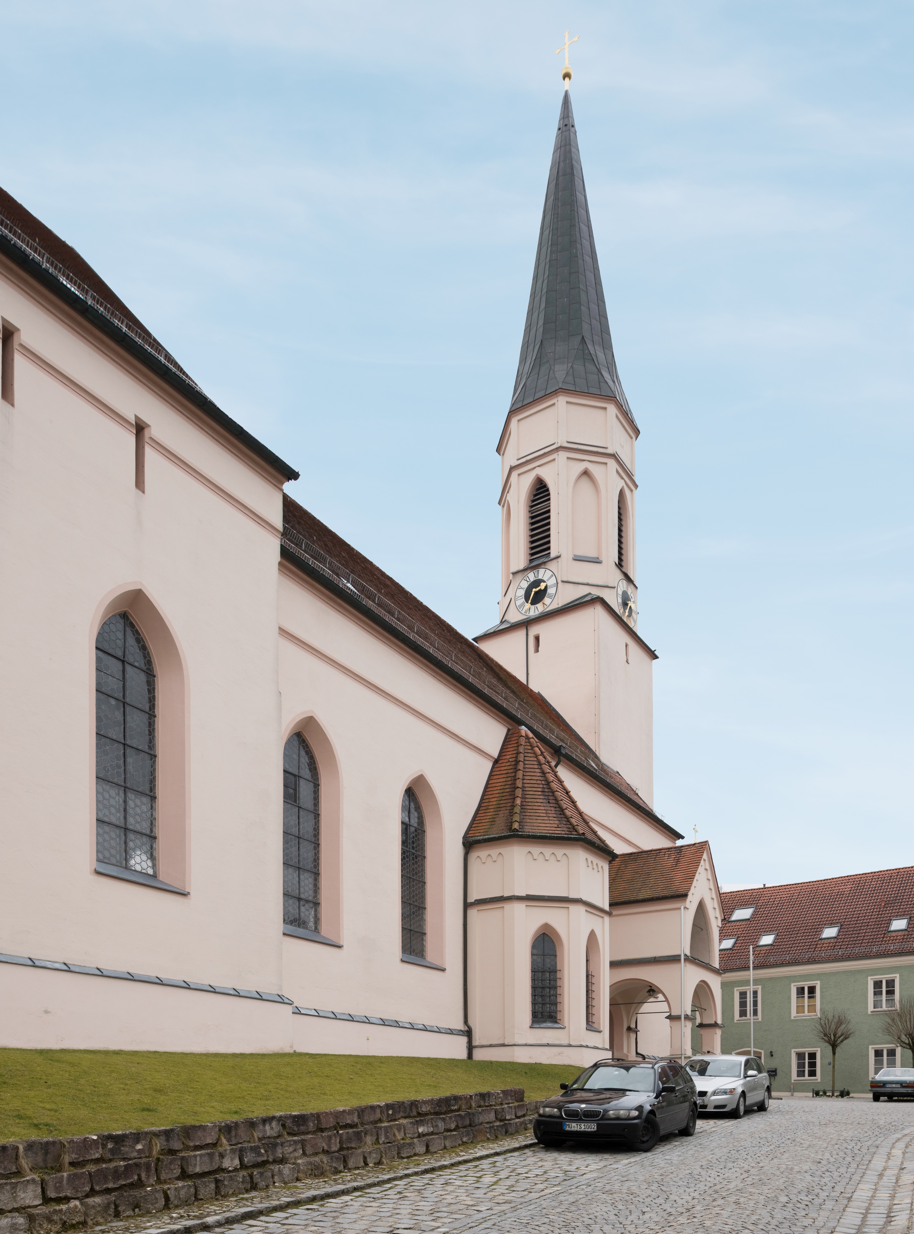 Süd_Seite_Kirche_Haag